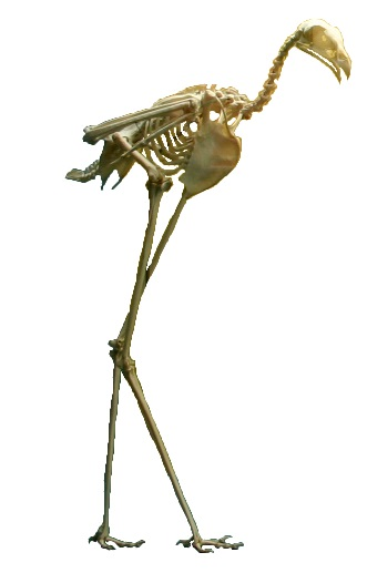 Secretary bird skeleton